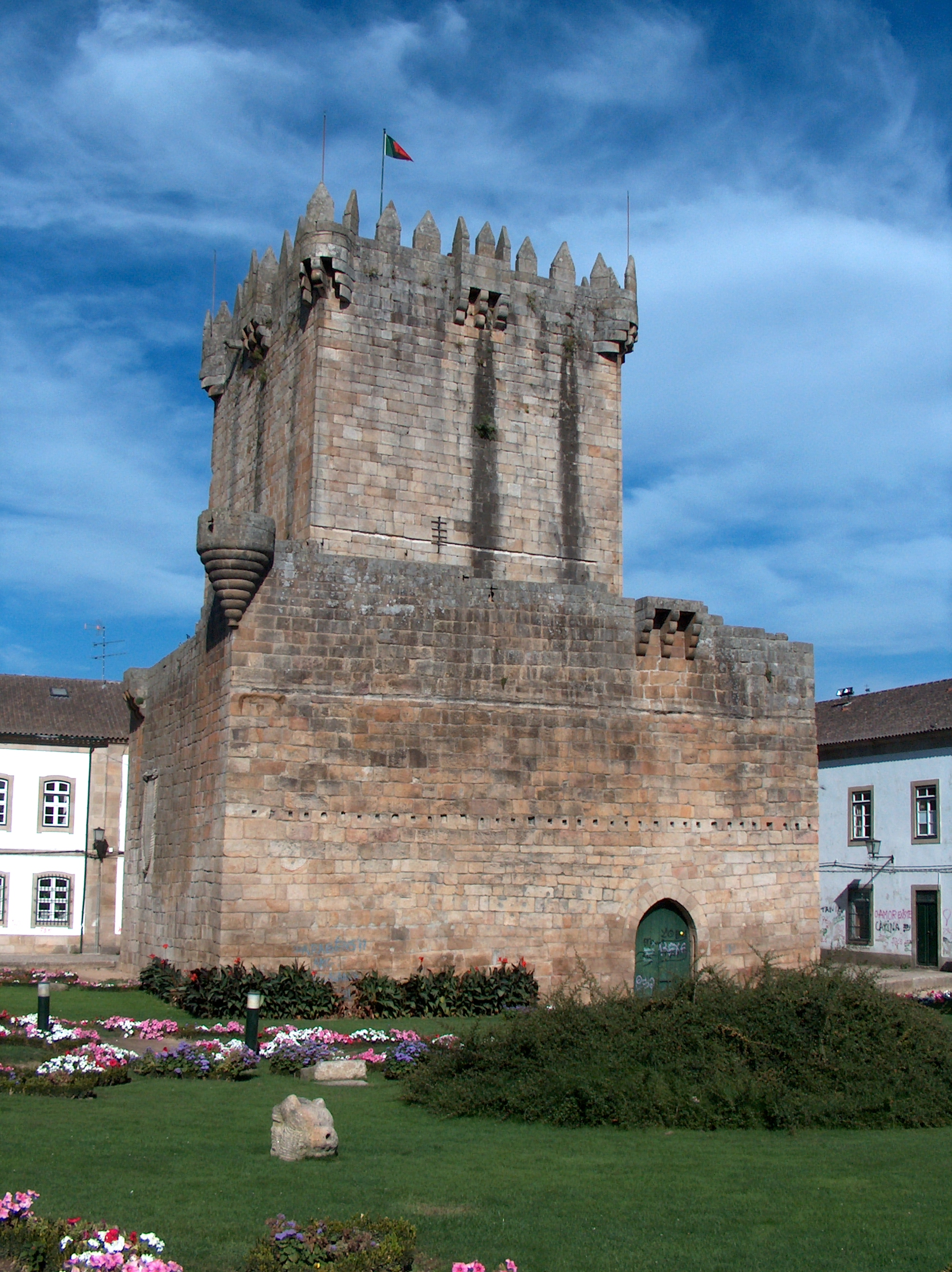 Descrição Castelo de ChavesTorre de menagem do Castelo de Chaves, concelho de Chaves, Distrito de Vila Real Fonte Carregada pelo autor Autor João Carvalho